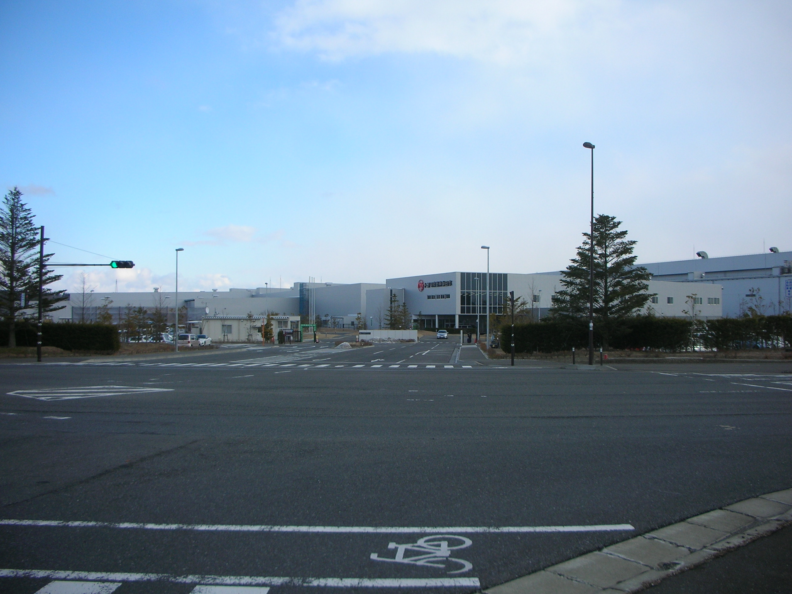 トヨタ自動車東日本 本社正門